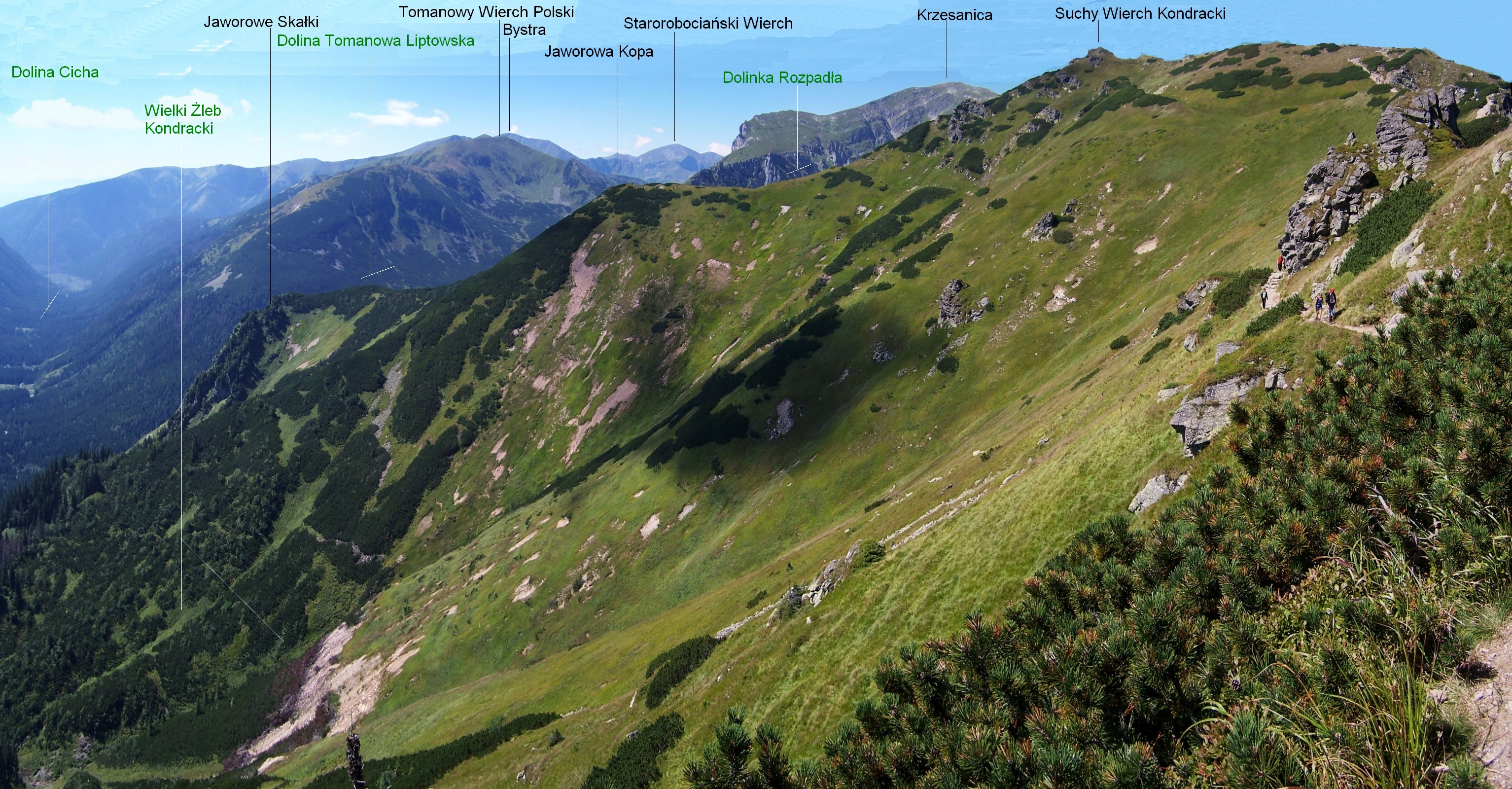 Widok z Suchych Czub Kondrackich